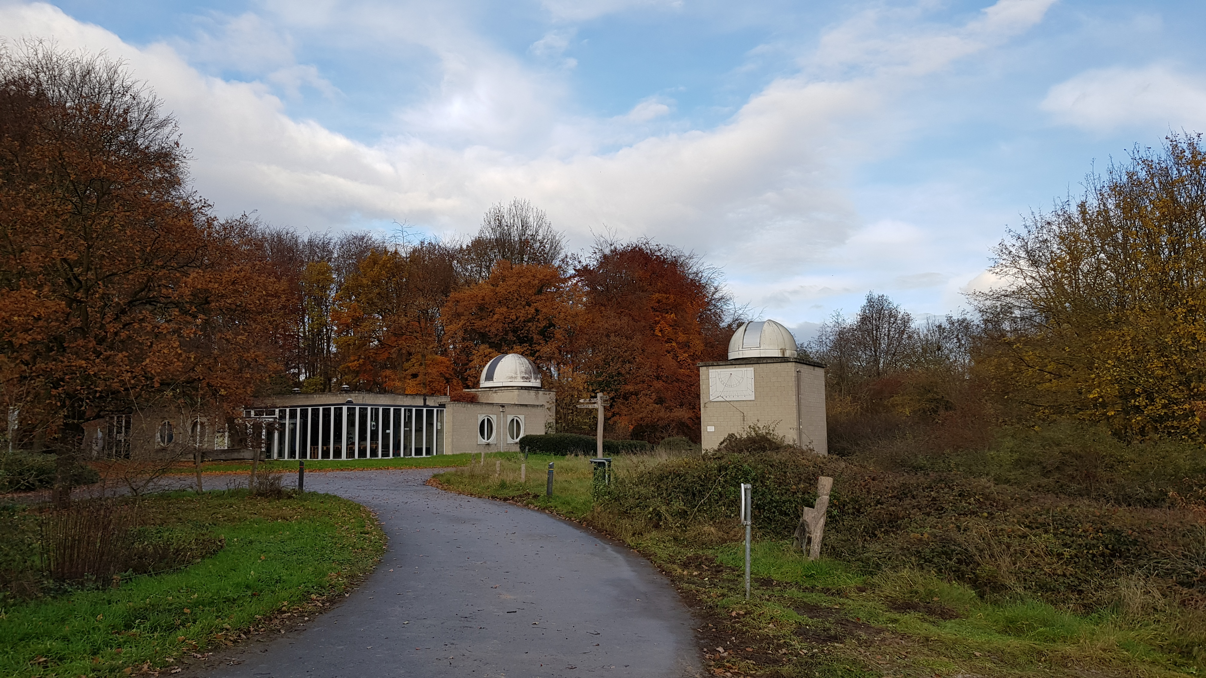 Sterrenwacht Limburg op de Brunssummerheide, Heerlen, Nederland